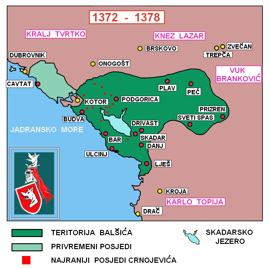 Teritorija Balšića u vrijeme Stracimira i Đurađa I.